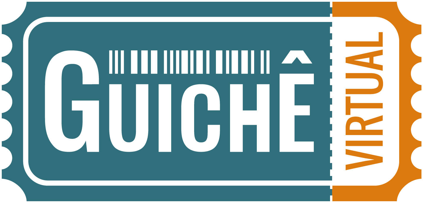 Logotipo do Guichê Virtual